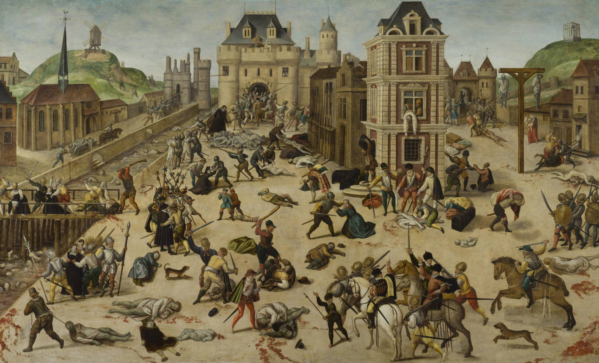 La topographie, manipulée, est adaptée au désir de montrer ensemble les lieux principaux de cette tragédie. On reconnaît à gauche l'église du couvent des Grands-Augustins (aujourd’hui disparue) où sonna le tocsin qui déclencha les tueries, la Seine et le pont des Meuniers. Au centre à l'arrière-plan, le Louvre et, devant le bâtiment, Catherine de Médicis la veuve noire, principale instigatrice des massacres. Au centre au second plan, l'hôtel particulier dans lequel l’amiral de Coligny, chef du parti protestant, est tué avant d’être défenestré, décapité et émasculé. Réunis autour de son cadavre, les chefs du parti catholique, les ducs de Guise et d’Aumale et le chevalier d’Angoulême. À droite à l'arrière-plan, la porte Saint-Honoré et, sur la colline de La Villette, le gibet de Montfaucon, où le corps de l'amiral sera pendu par les pieds. Rassemblant plus de 150 figures, l’œuvre est un véritable catalogue de la cruauté en période de guerre civile. Femme enceinte éventrée (à droite du tableau au second plan), enfants traînant un nourrisson au bout d’une corde (au second plan au centre, à droite du pont des Meuniers), femme embrochée sur une pique de rôtisseur (juste derrière les enfants traînant le nourrisson), cadavres dénudés et empilés (notamment aux pieds de Catherine de Médicis), maisons pillées (derrière les chefs catholiques). Le roi Charles IX tire à l’arquebuse sur ses propres sujets depuis une fenêtre du Louvre (probablement de la tour de gauche du bâtiment). Ce tableau est tout à fait exceptionnel en raison de la qualité de son exécution, mais aussi parce que les représentations contemporaines des massacres de la Saint-Barthélemy sont très rares. Il porte la signature du peintre François Dubois, protestant d’Amiens réfugié à Genève après les massacres.